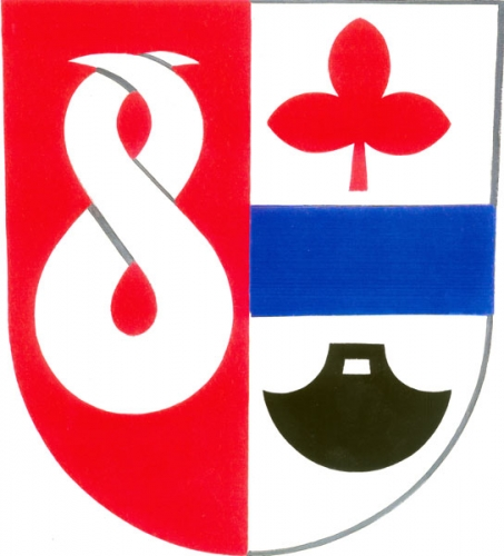 Znak, Chromeč, okres Šumperk